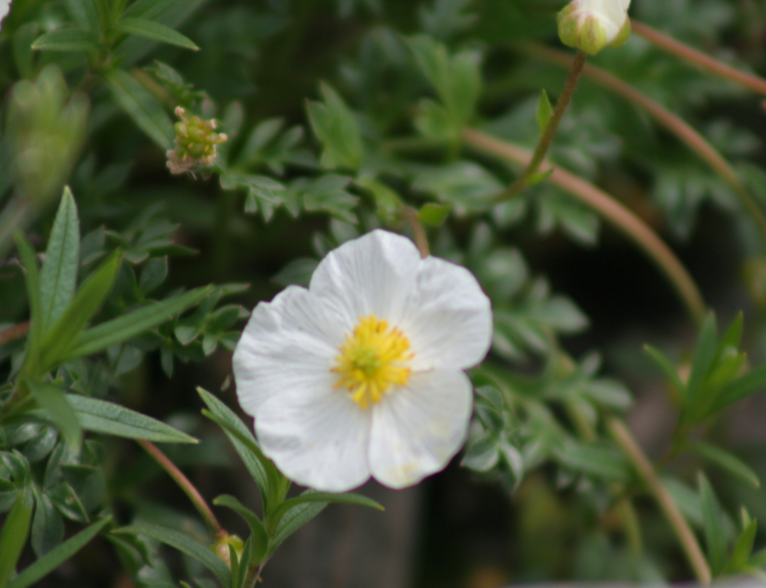 Ranuncolo di Seguier - Località: "Giardino Botanico delle Alpi Orientali", Monte Faverghera (BL), 1500 m s.l.m.